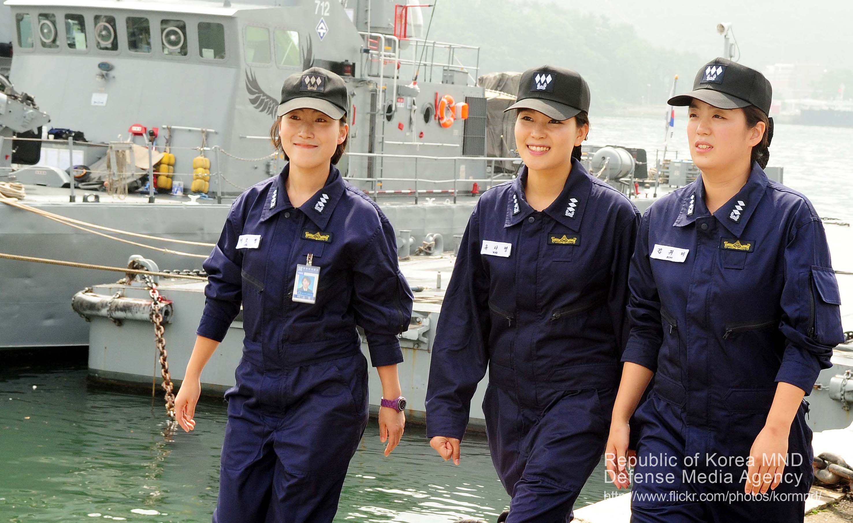 해군 관계관은 12일 “지난달 말 보직심사위원회에서 안미영(33)·김귀미(29)·이소정(29)·유나영(29) 대위를 참수리급 고속정 정장으로 임명했다”며 “이들 중 환태평양훈련(림팩·RIMPAC)에 참가한 안 대위를 제외한 3명이 보직 전 교육을 마치고 8월 초부터 고속정 정장 임무를 수행한다”고 밝혔다. 촬영 - 정의훈 기자